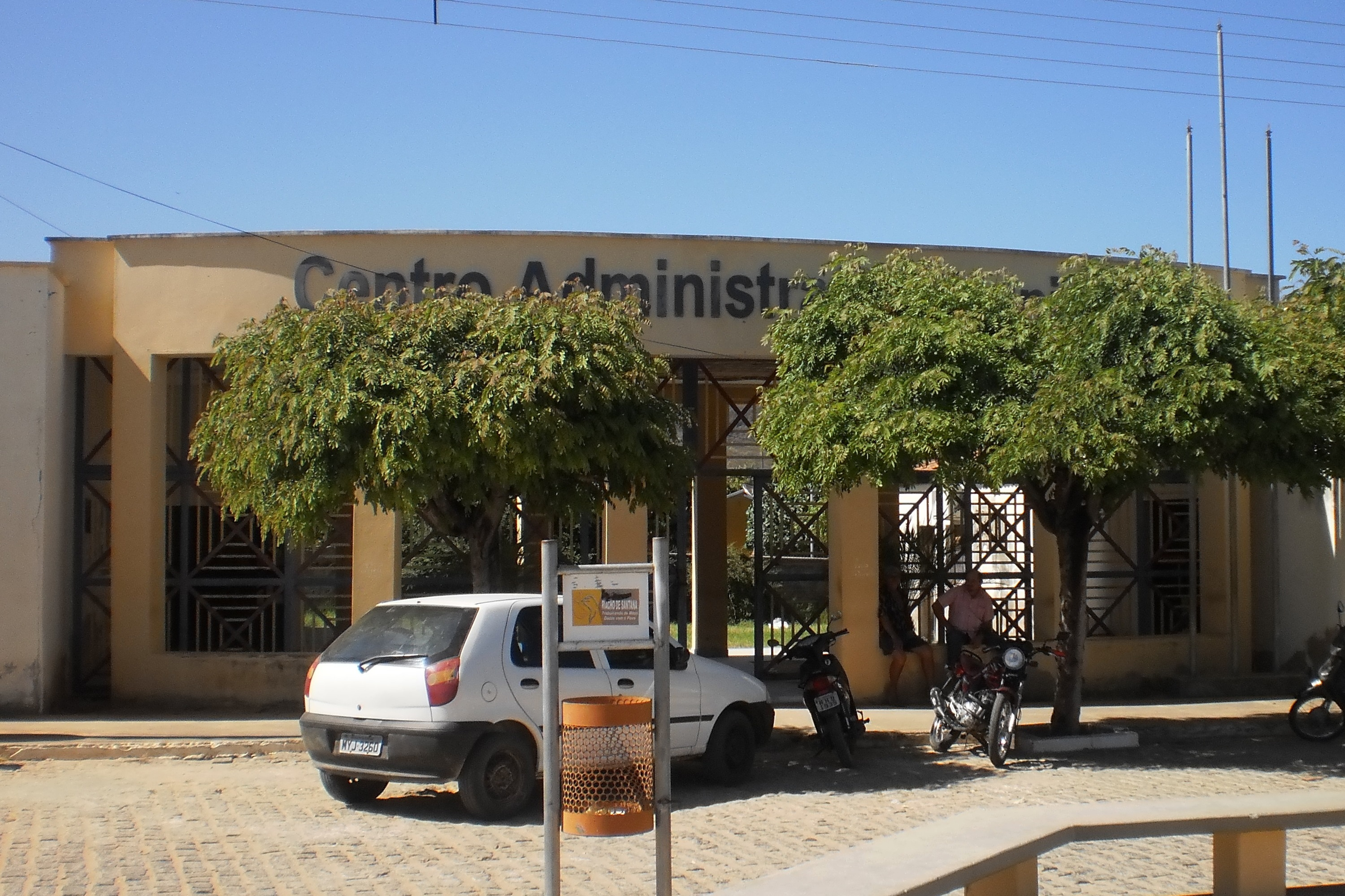 Centro Administrativo Municipal, onde se localiza a Prefeitura de Riacho de Santana - Rio Grande do Norte, Brasil.